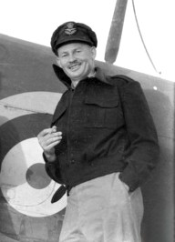 Western Desert. Cropped image of Flight Lieutenant John Jackson.